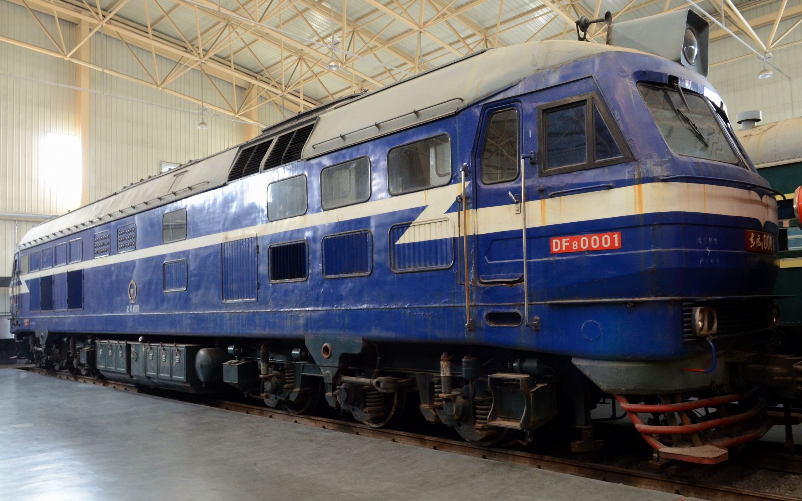 配属武局南段的DF8型0001号机车保存在中国铁道博物馆